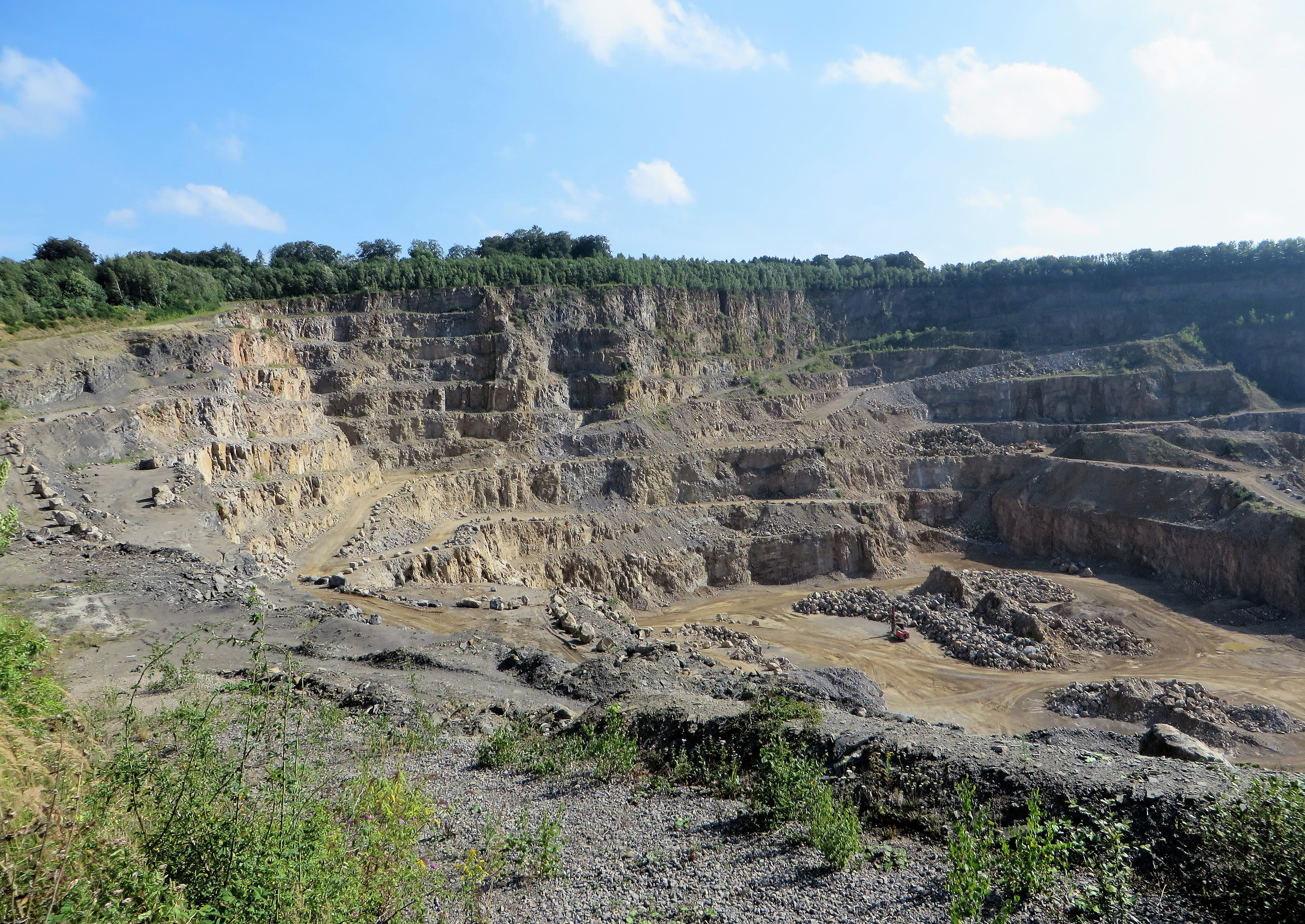 Steinbruch Donnerkuhle der Rheinkalk GmbH (Lhoist-Gruppe) in Hagen. Der nördliche Aussichtspunkt (Foto) ist über einen Seitenweg der Hohenlimburger Straße (B 7) erreichbar. Im Steinbruch Donnerkuhle wird schon seit Beginn des 20. Jahrhunderts dolomitischer Kalkstein abgebaut. Die Fläche des Steinbruchs beträgt rund 67 ha. Seine Vertiefung wurde 2011 bis zu einem Niveau von +42 m NHN genehmigt. Die Donnerkuhle ist ein in Deutschland einzigartiges Rohstoffvorkommen und liegt am Nordrand eines Massenkalkvorkommens von bis zu 600 Meter Mächtigkeit, das vor etwa 370 Millionen Jahren im höheren Mitteldevon gebildet wurde. Der abgebildete Bereich liegt im Landschaftsschutzgebiet „Hassley“ und wird im Osten vom Naturschutzgebiet „Temporärer Mastberg“ (Foto: links oberhalb der Steinbruchkante), im Westen vom Naturschutzgebiet „Ochsenkamp“ begrenzt.